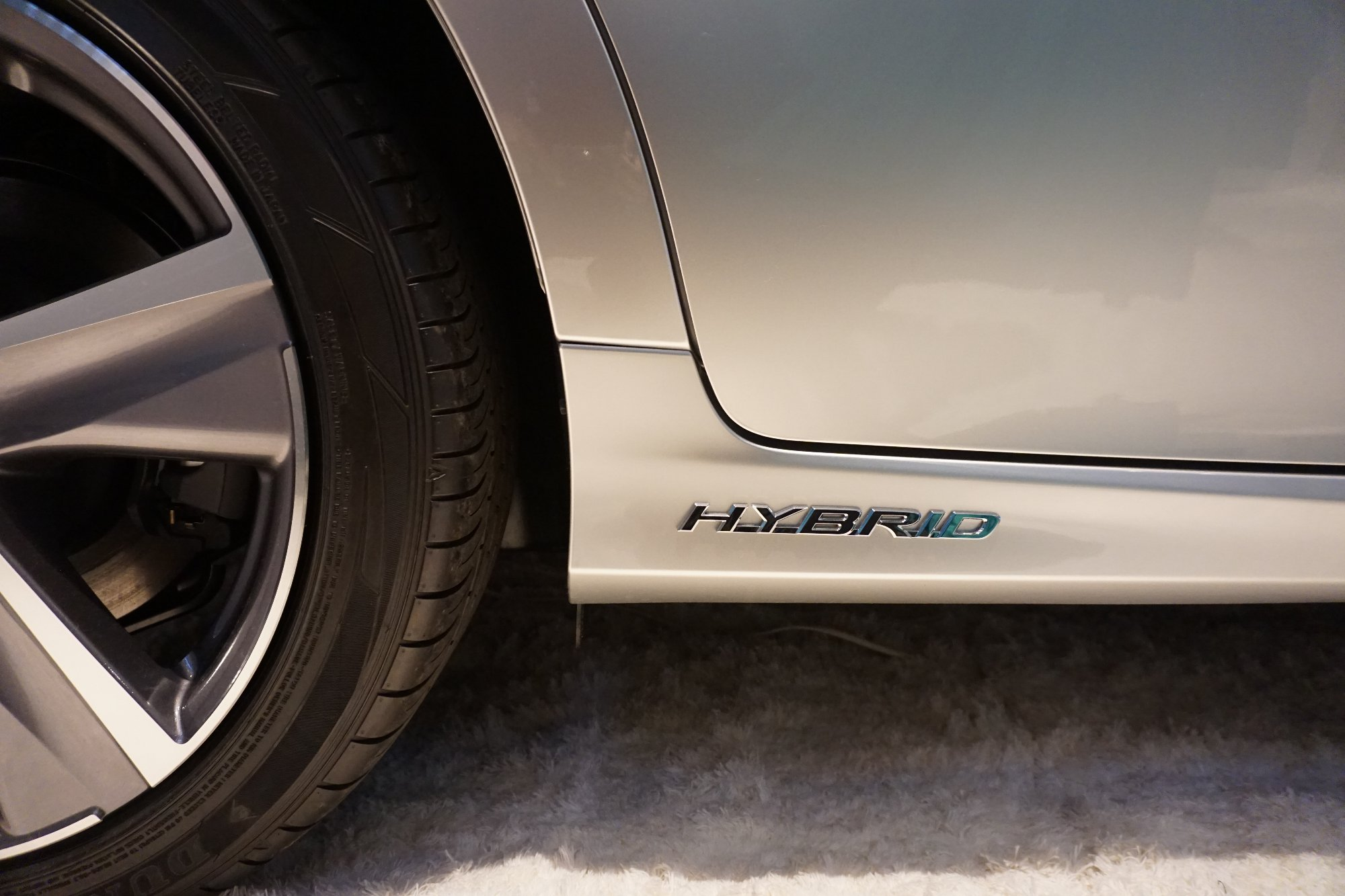 LEXUS GS300h(2015model) HYBRIDエンブレム INTERSECT by LEXUS TOKYOで撮影